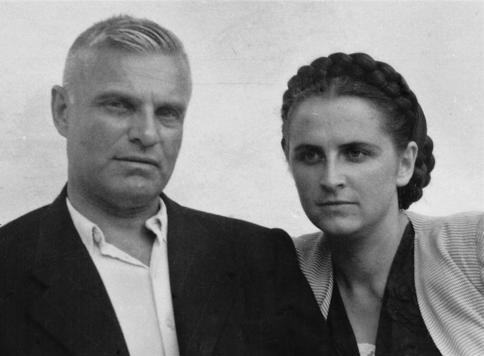 Василий Иванович Казаков с супругой Светланой Павловной на отдыхе в Сочи. Светлана Павловна Казакова (в девичестве Смирнова) родилась в 1923 году в городе Севастополе. Участница Великой Отечественной войны с 1941 года. Службу начала чертёжницей в штабе Черноморского флота. После эвакуации из Севастополя с ноября 1942 года по июнь 1943 служила писарем в отделе укомплектования штаба Закавказского фронта. Одновременно училась в Ленинградском институте связи, эвакуированном в Тбилиси. С лета 1943 года служила в частях правительственной связи Центрального, Белорусского и 1-го Белорусского фронтов. Боевой путь младший техник-лейтенант С.П. Смирнова окончила в Берлине в должности чертёжника отдела правительственной связи НКВД СССР при штабе 1-го Белорусского фронта. Награждена двумя орденами Великой Отечественной войны 2 степени, медалями «За оборону Севастополя», «За оборону Кавказа», «За освобождение Варшавы», «За взятие Берлина», «За победу над Германией», а также двумя польскими и многочисленными юбилейными медалями.